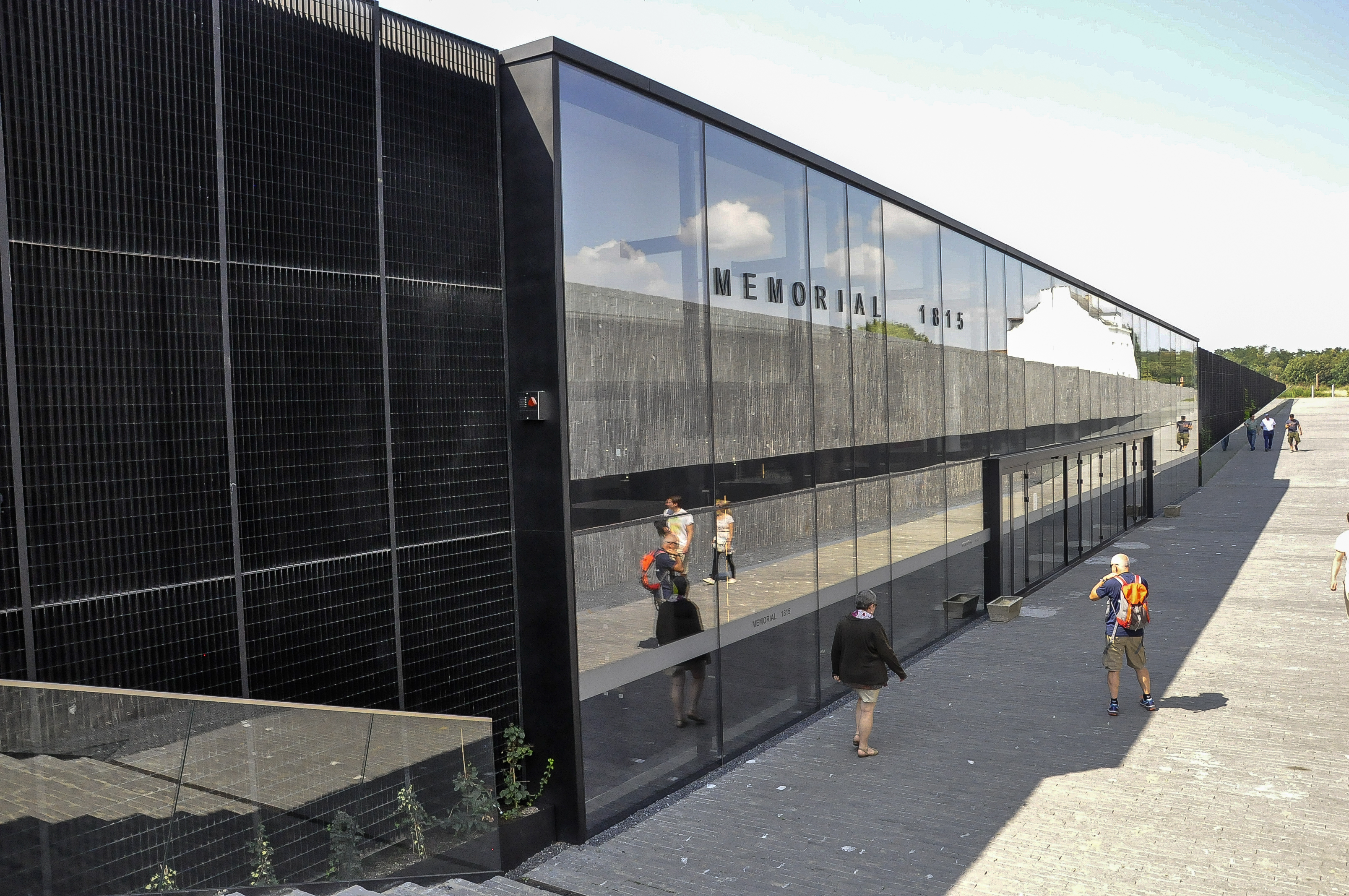 Mémorial 1815, Eigenbrakel, België